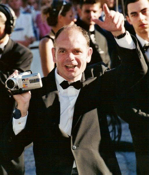 Jean-Pierre Darroussin au festival de Cannes